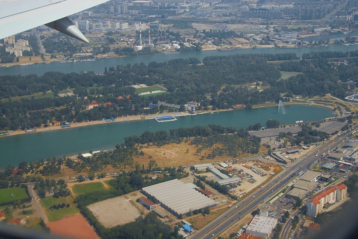 Поглед на Аду Циганлију из авиона. Аутор фотографије: Драган Жебељан